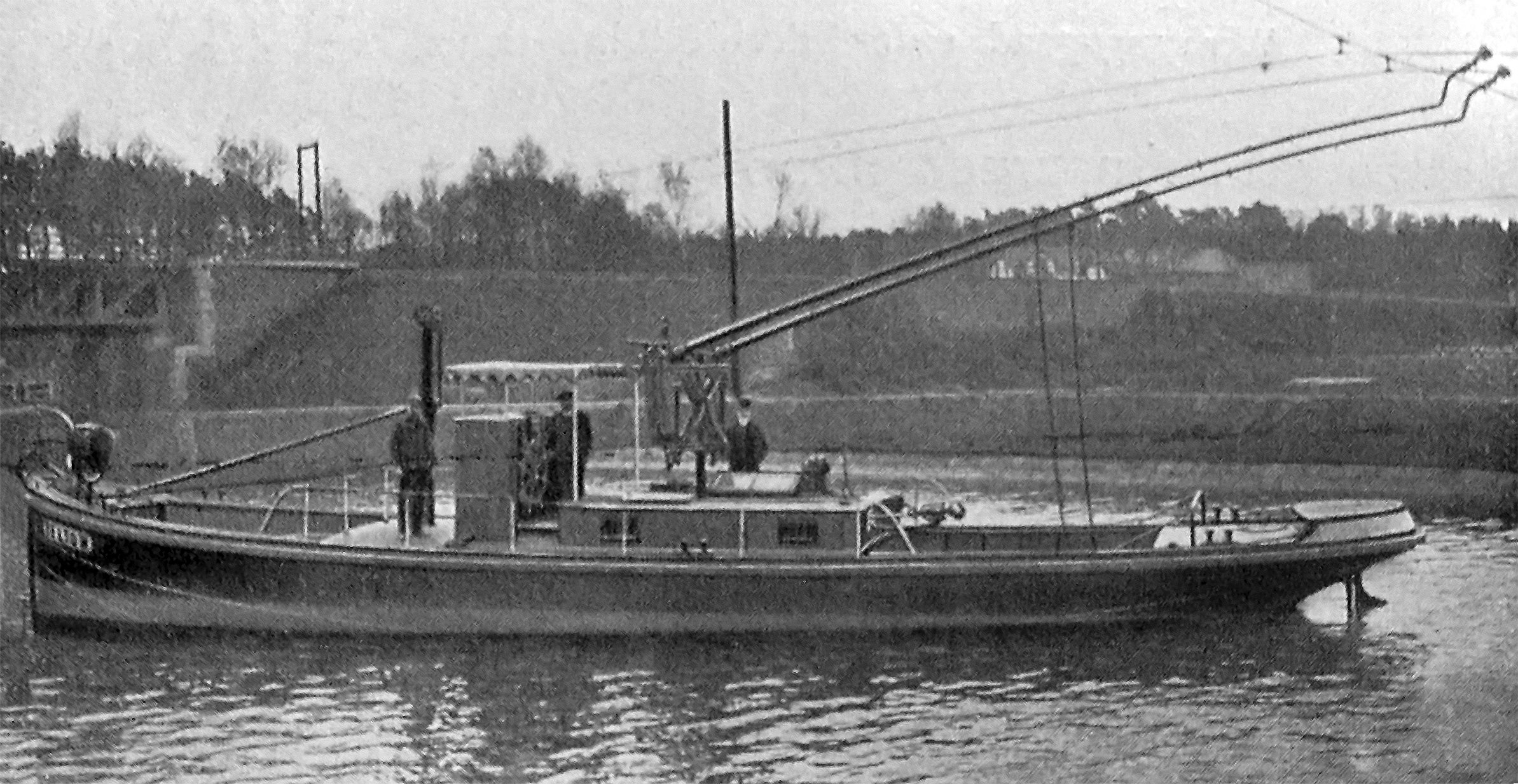 Oberleitungsboot auf dem Teltower Kanal